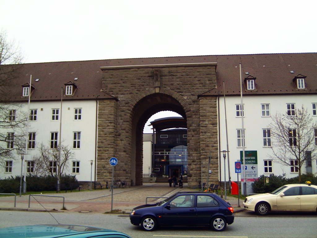 Haupteingang des Heidberg-Krankenhauses (ehemalige SS-Kaserne)/Main-entrance of the Heidberg-Krankenhaus (former barracks of the SS)